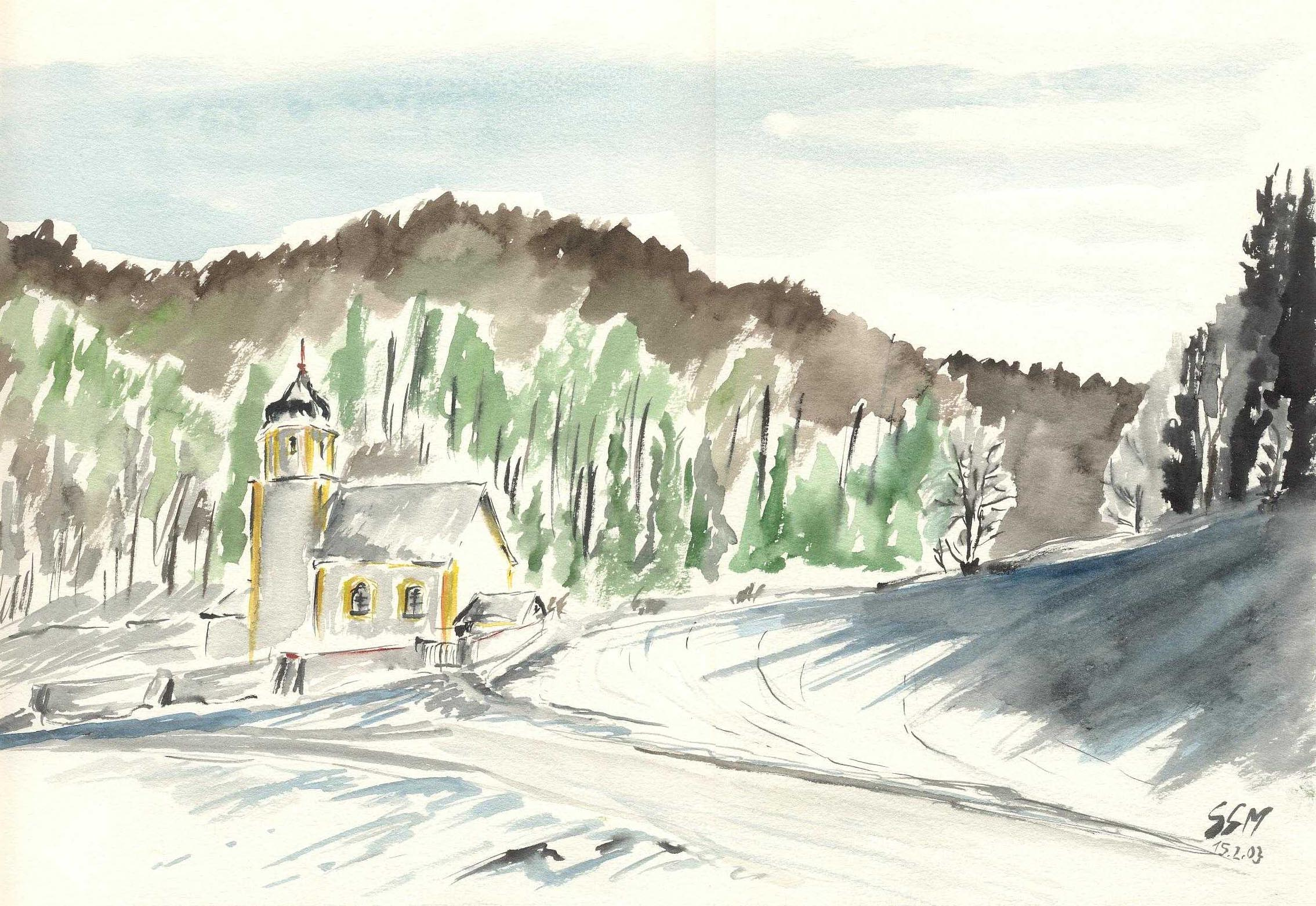 Schafhausen im Anlautertal, Kirche St. Martin. Aquarell von Siegfried Schieweck-Mauk, Eichstätt, Werk-Verz. Nr. 882